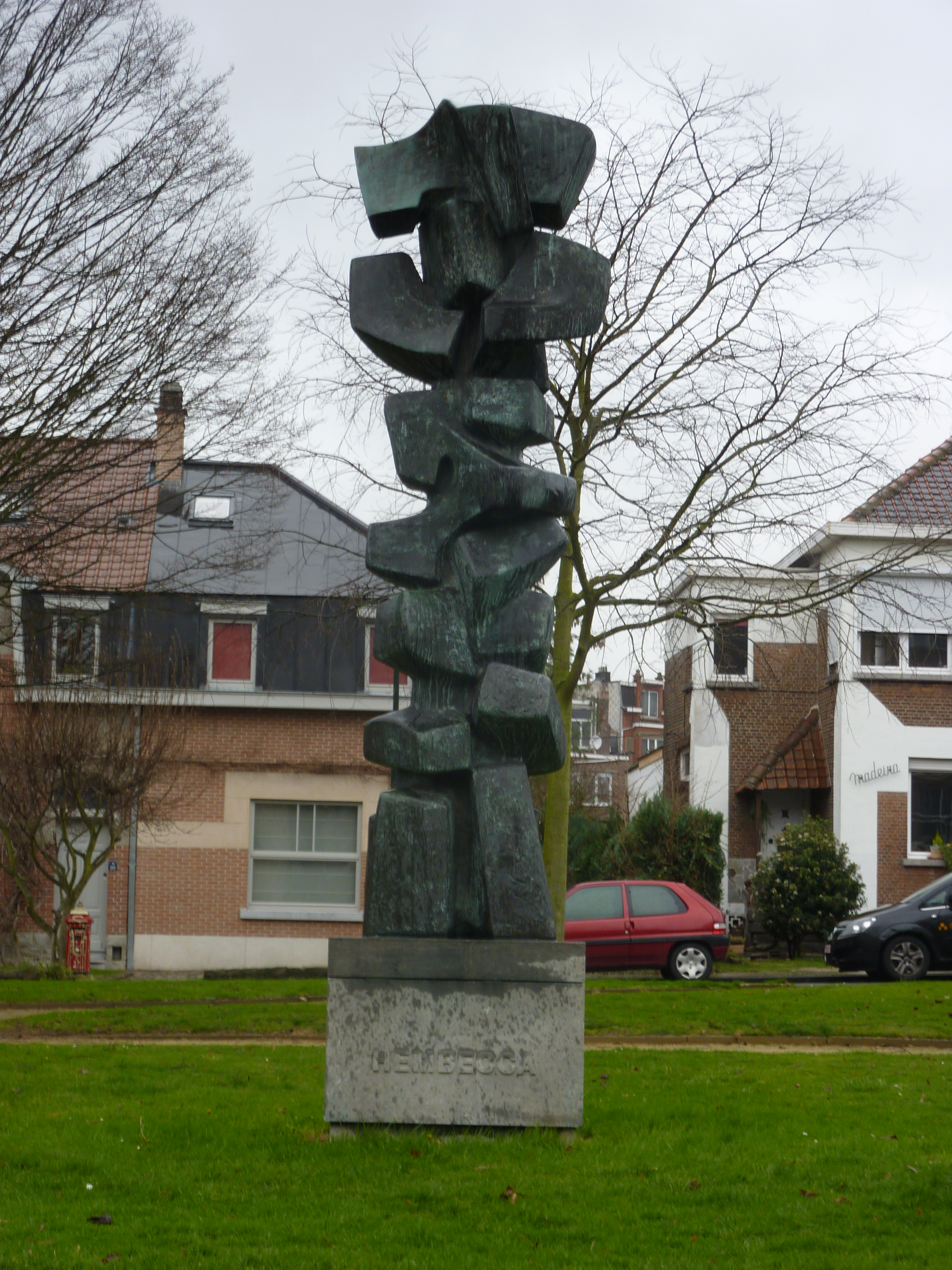 Œuvre HEMBECCA par Albin Courtois pour le 800ème anniversaire de Neder-Over-Heembeek, Bruxelles, Belgique.